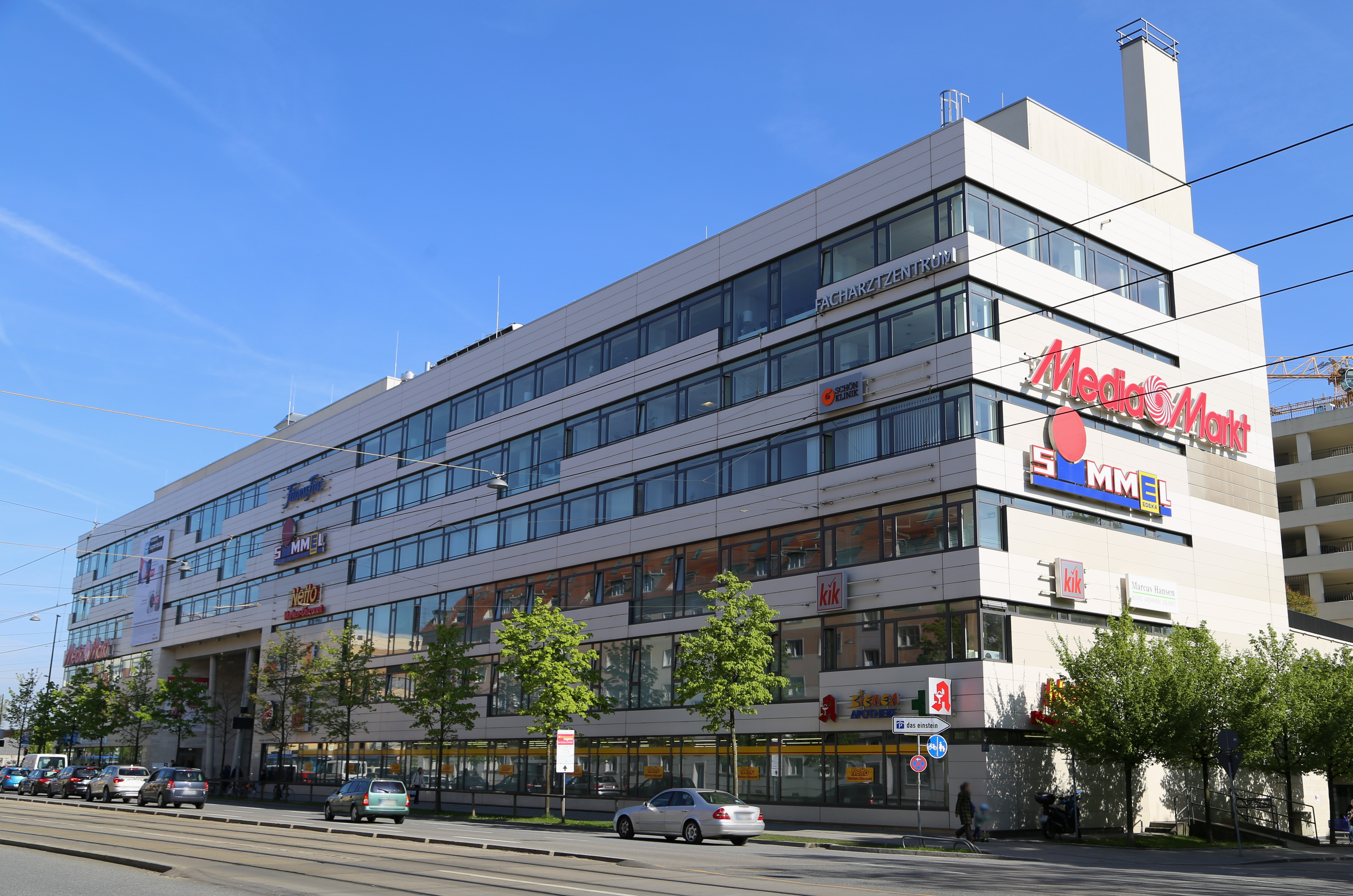 Einkaufszentrum daseinstein, Einsteinstraße 130, München